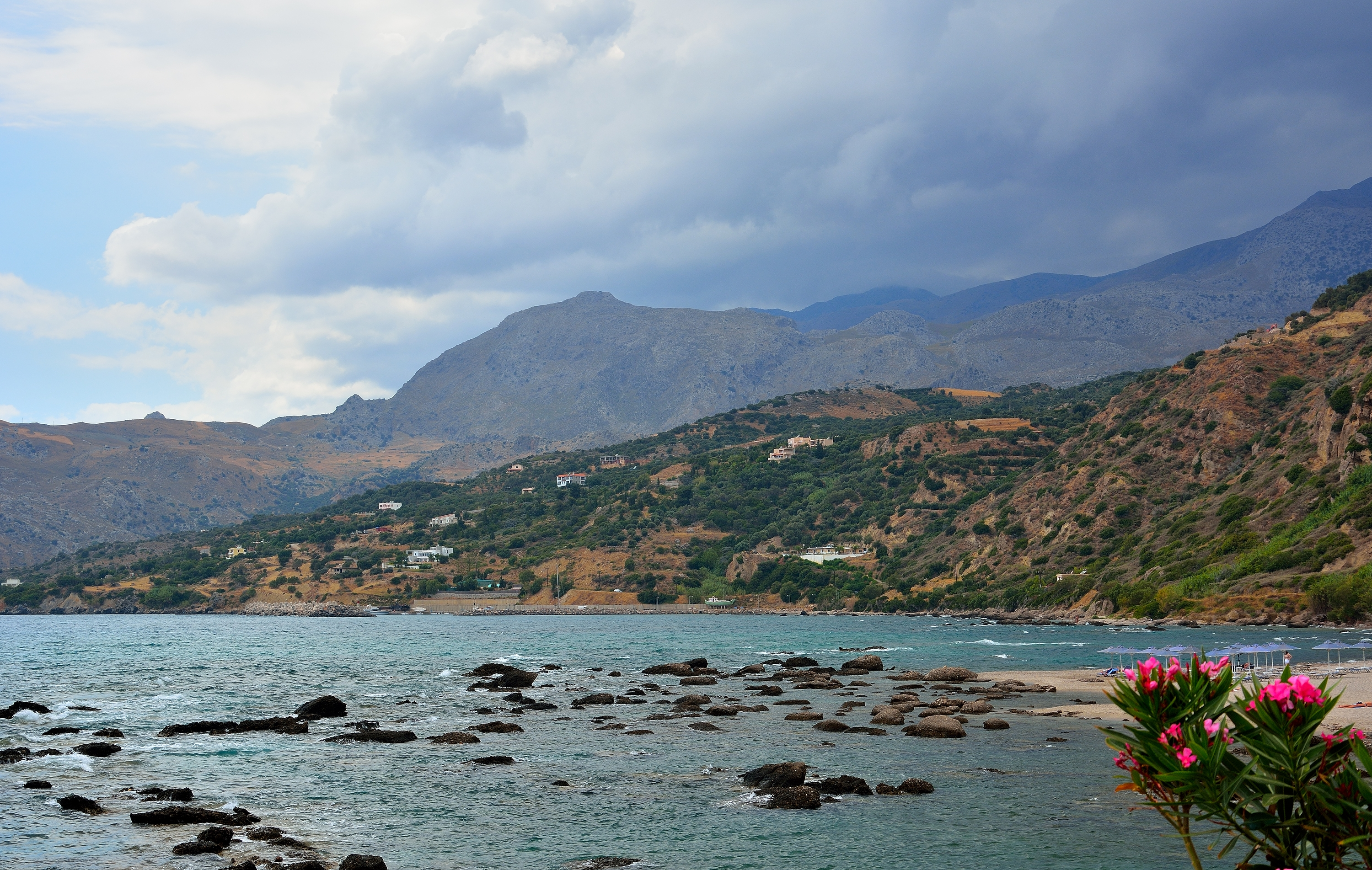 Ливийское море. Вид из деревни Плакиас (о.Крит)